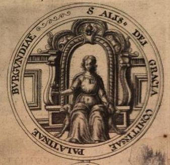 Alix Meránská